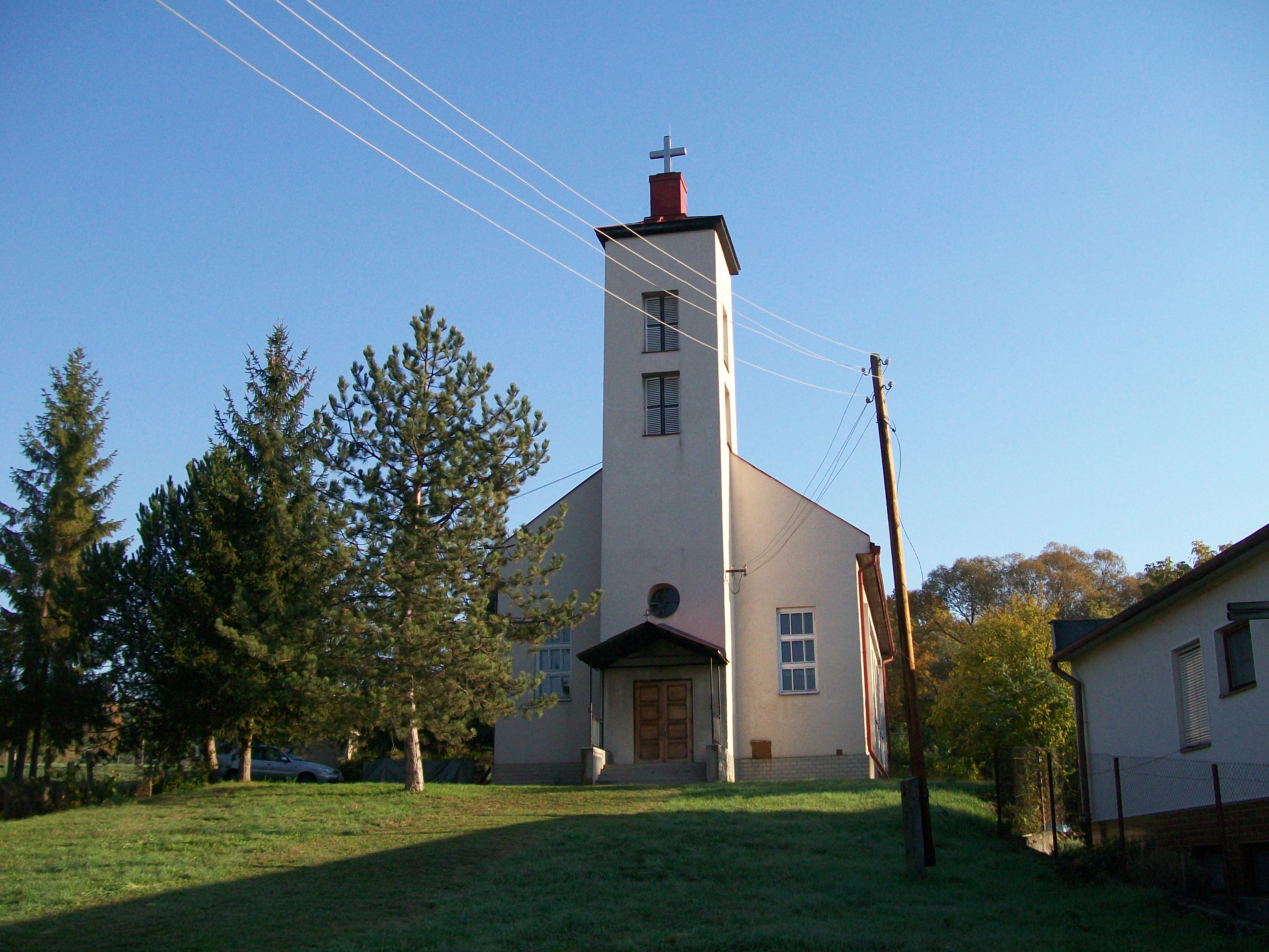 Evanjelický kostol v obci Mašková, okres Lučenec